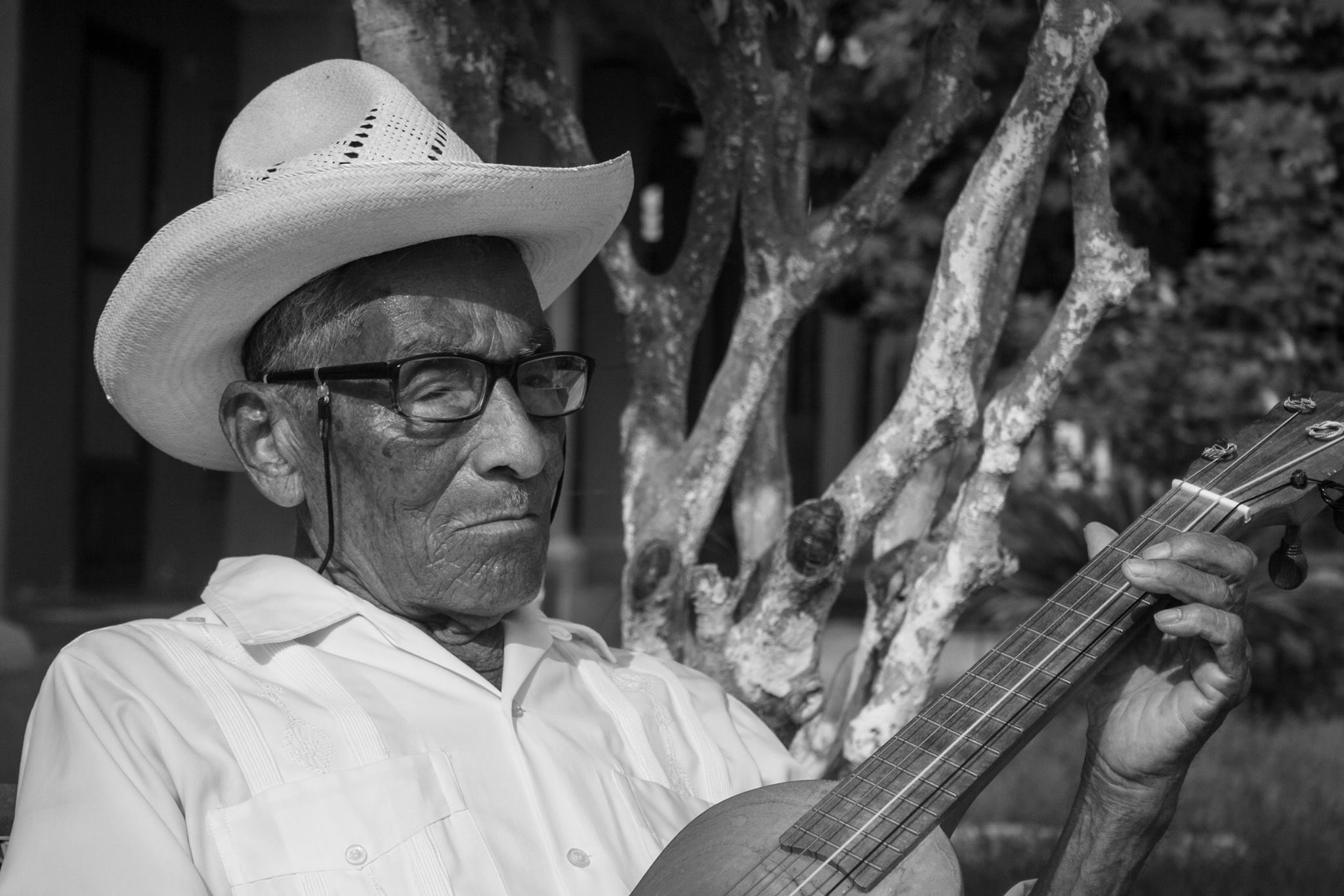 Fotografía de Don Cirilo Promotor Decena tomada en Tlacotalpan, Veracruz. Realizada por Gustavo Maldonado Rivera.